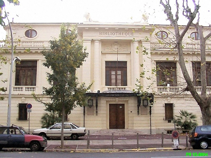 Villa Rambourg ou Bibliothèque du patrimoine . 21bis Boulevard Dubouchage.